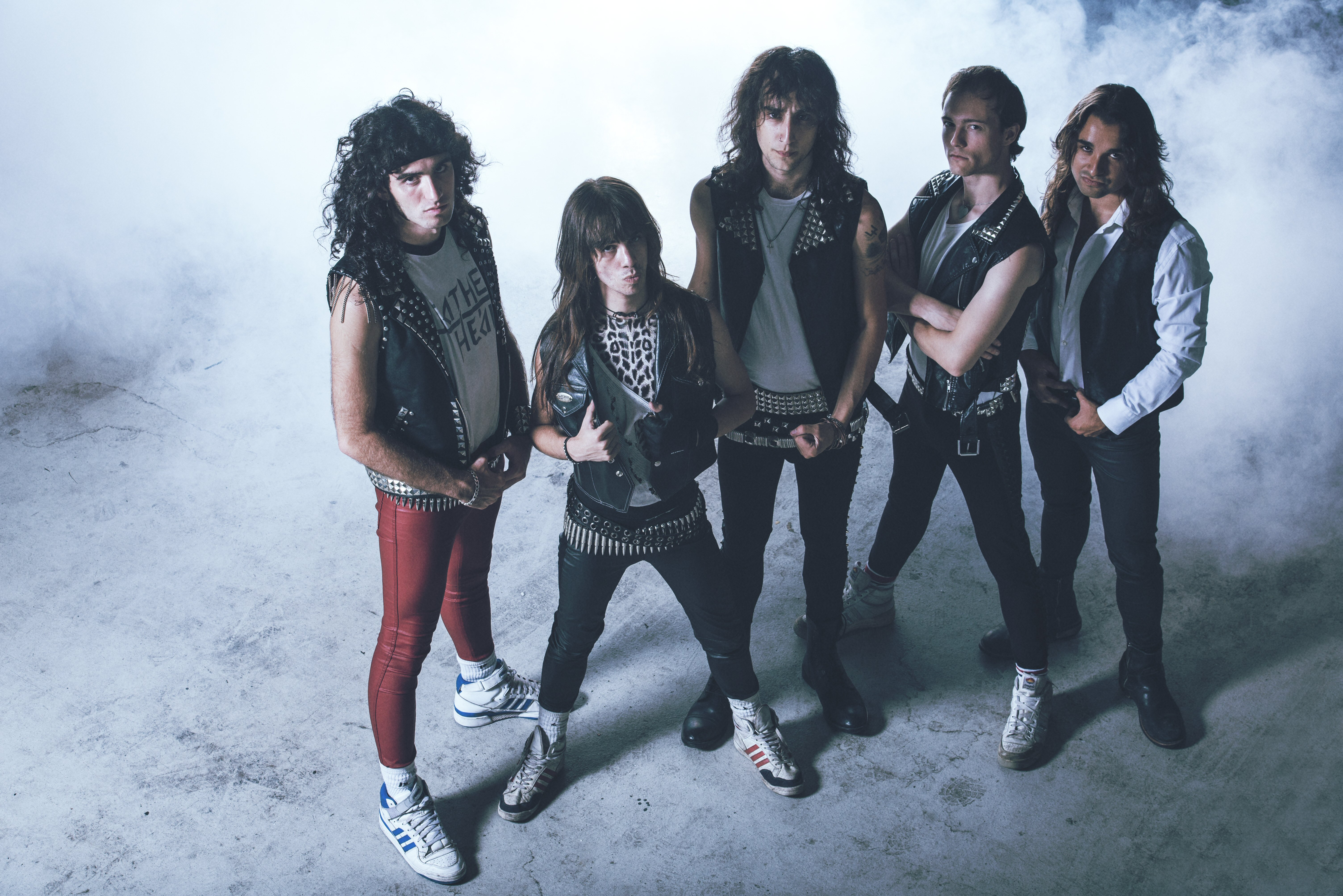 Leather Heart